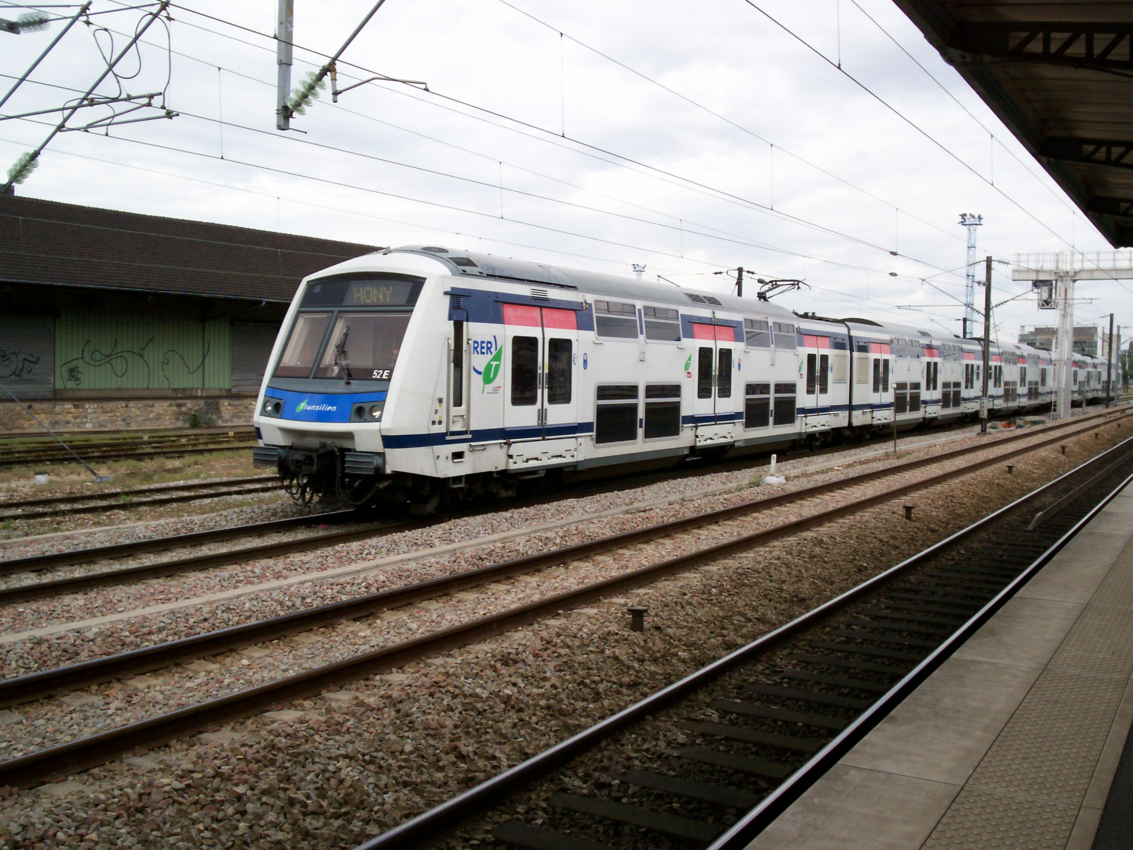 Rame Z22500 effectuant le trajet entre le dépôt de Noisy et Magenta où il assurera la mission HONY